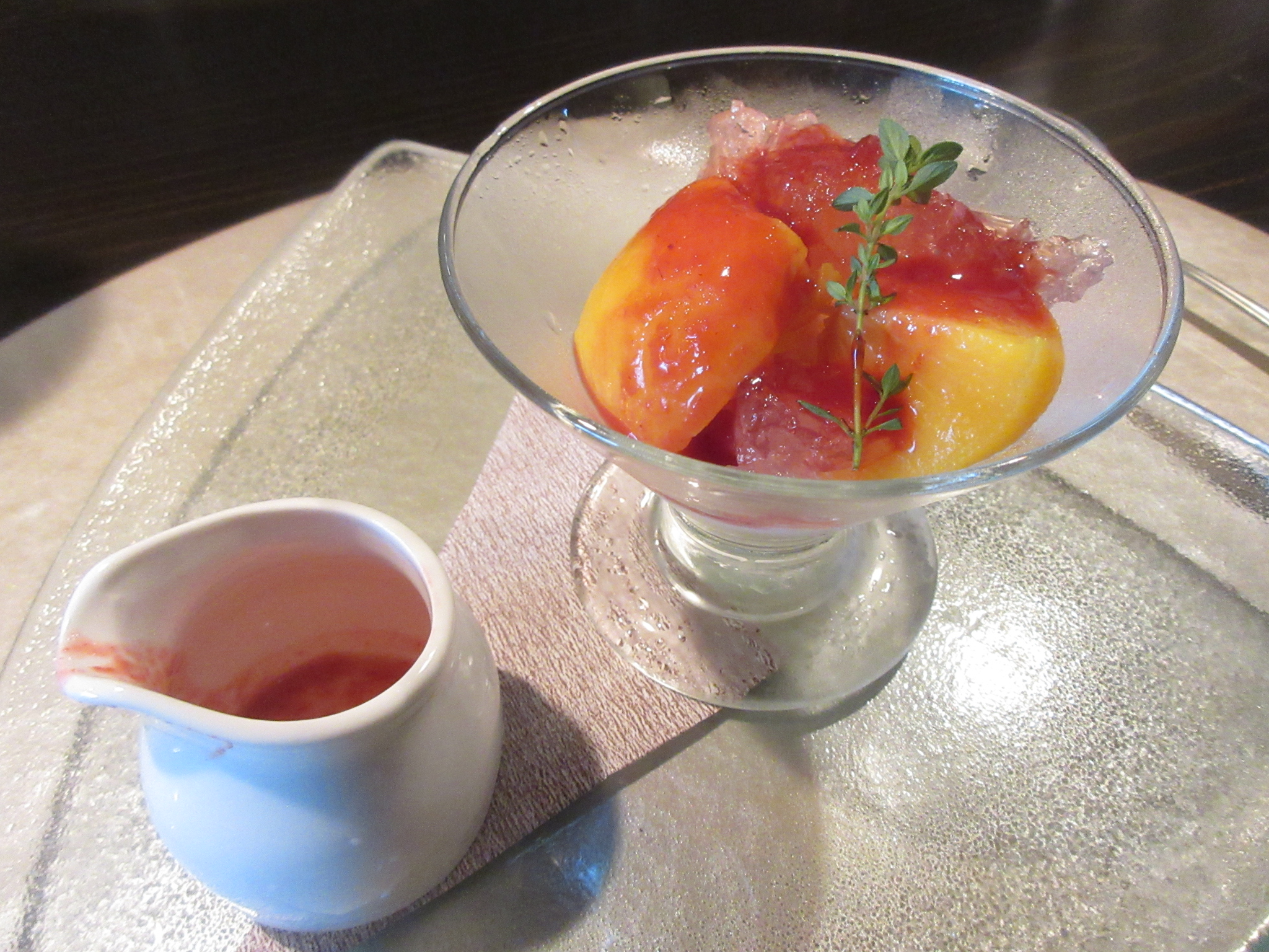 ピーチ・メルバ。愛知県のレストランにて撮影。